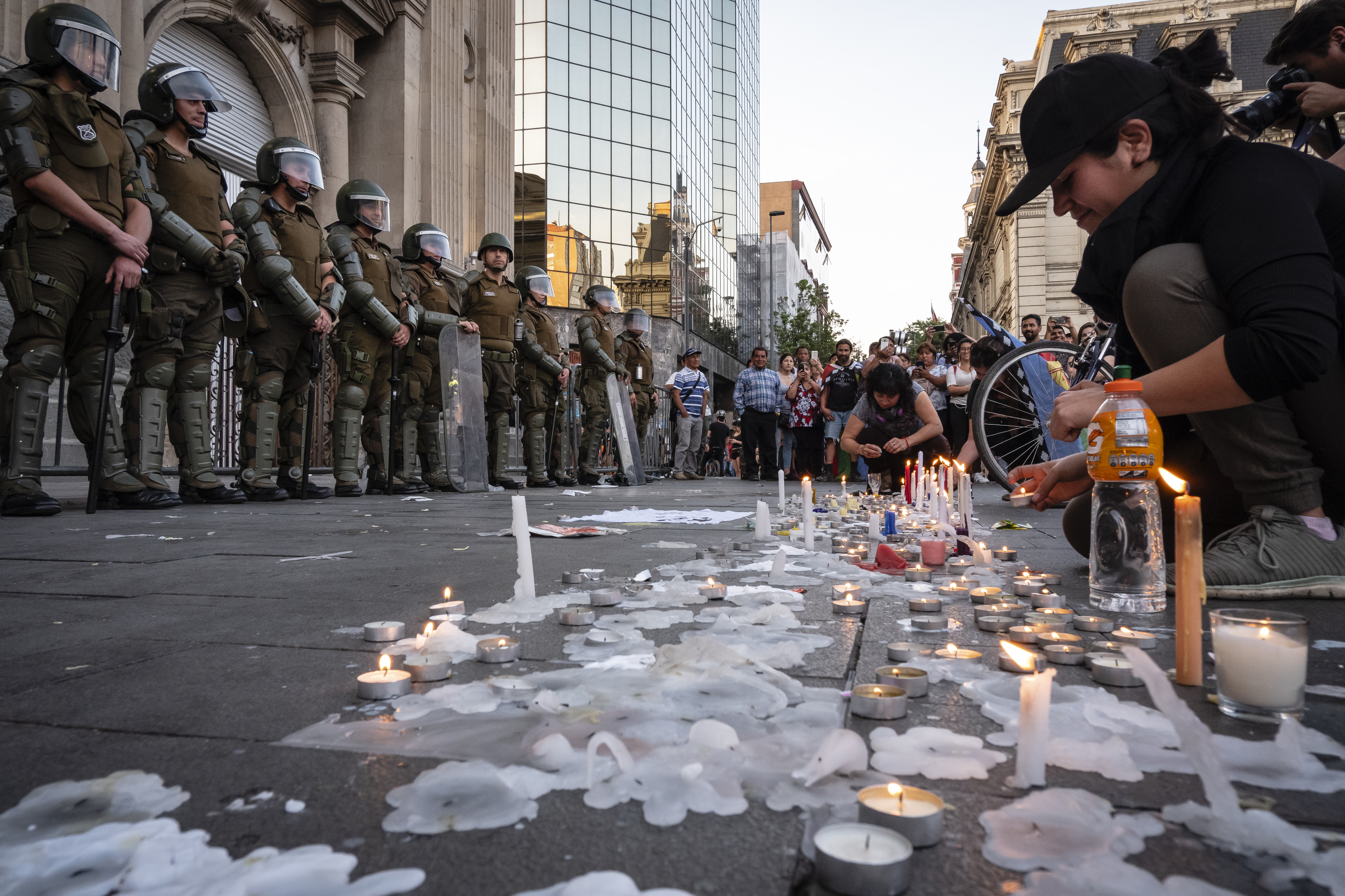 Homenaje al comunero Mapuche, Camilo Catrillanca, tras cumplir un año desde el asesinato a manos del “Comando Jungla”.